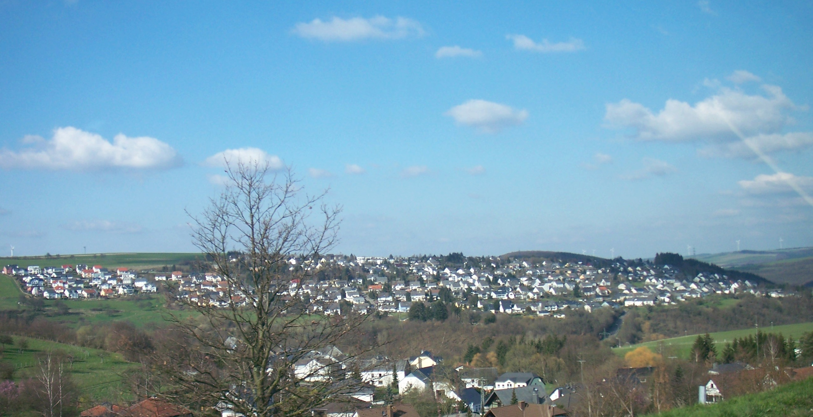 View to Gusterath in Landkreis Trier-Saarburg, Germany.